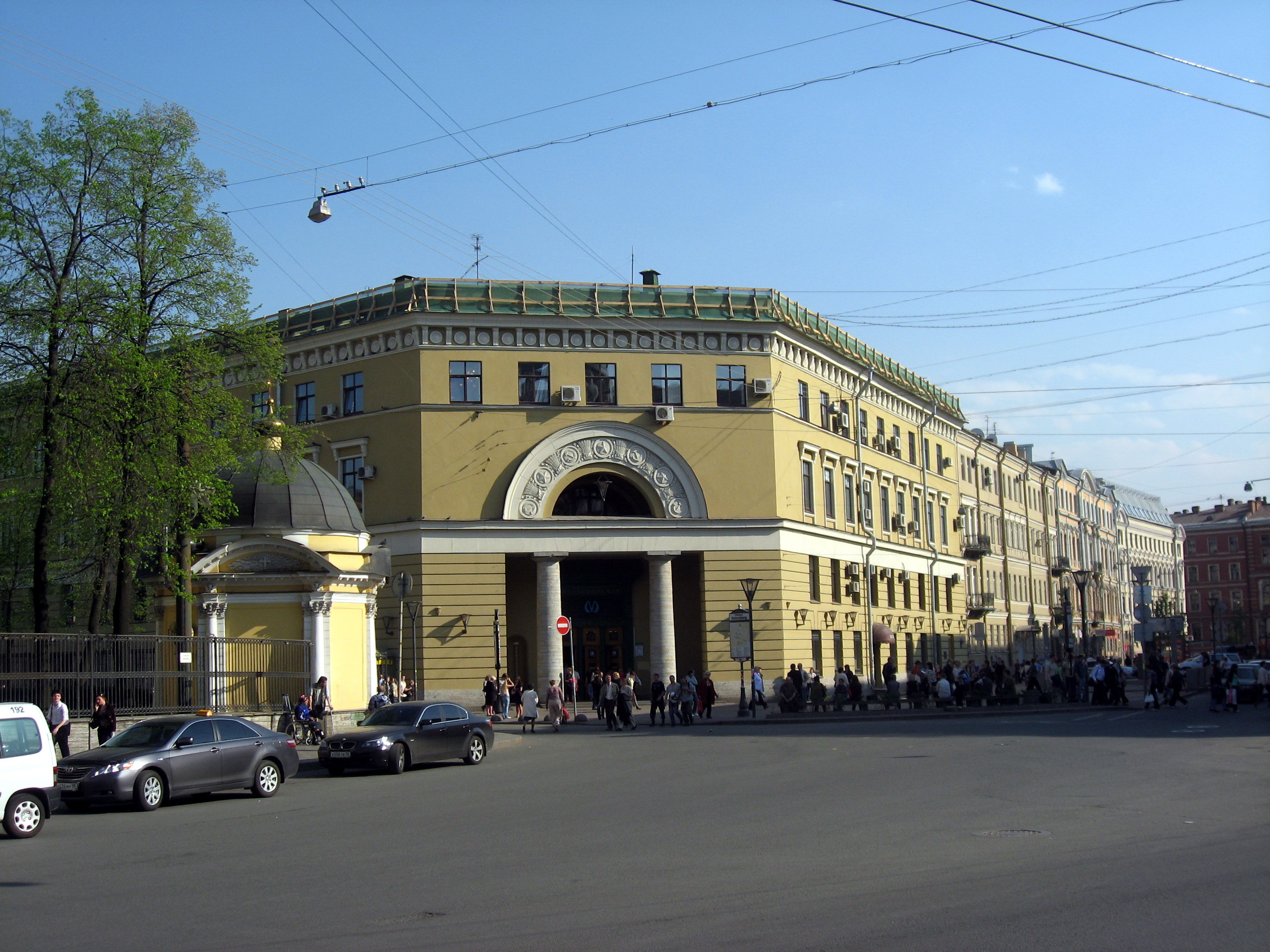 Sankt-Petěrburg (Petrohrad)